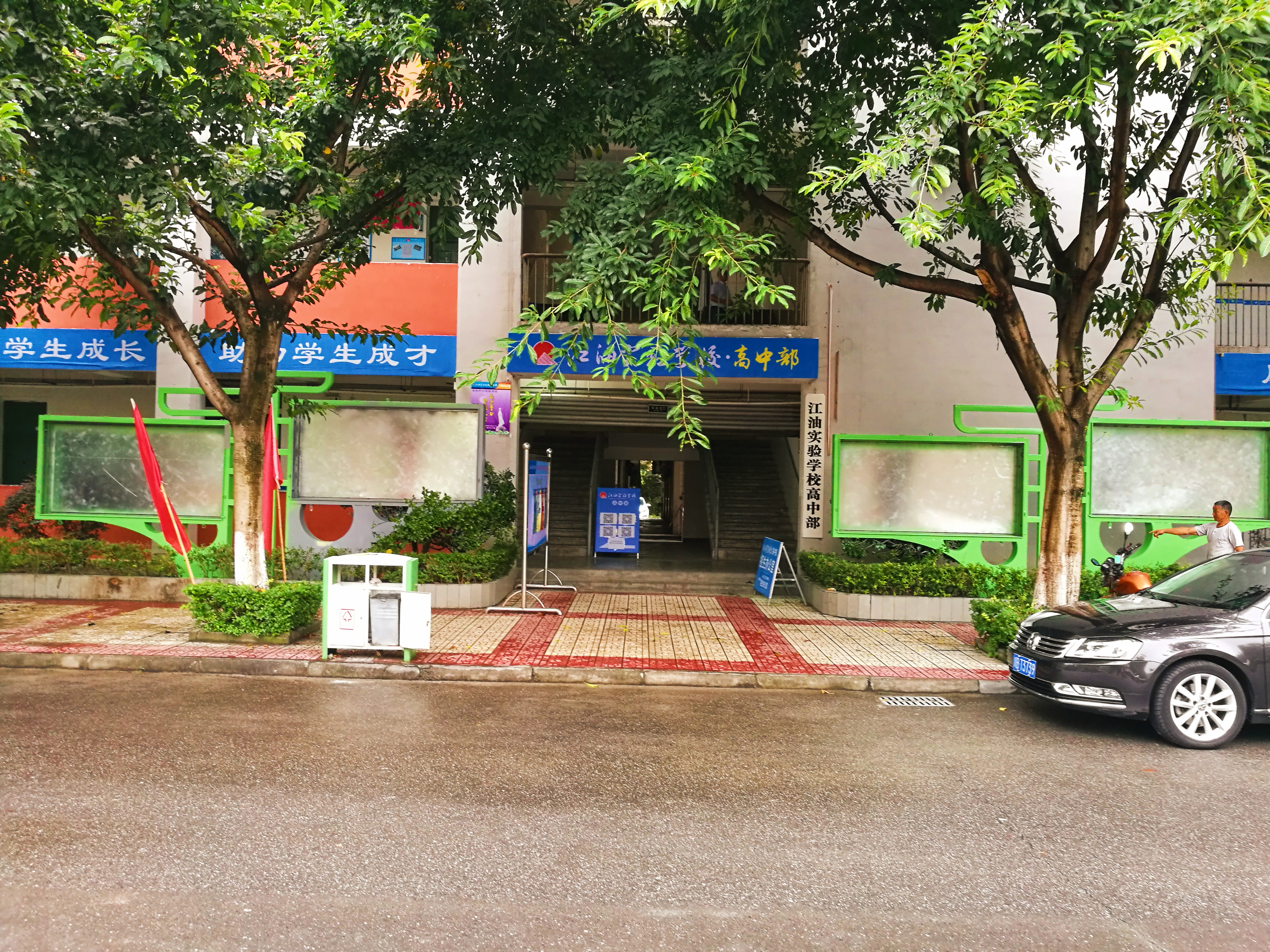 拍摄于2017-08-29上午，使用华为Mate9拍摄并运用泼辣修图（Windows应用商店版本）进行了色彩的些许调整。